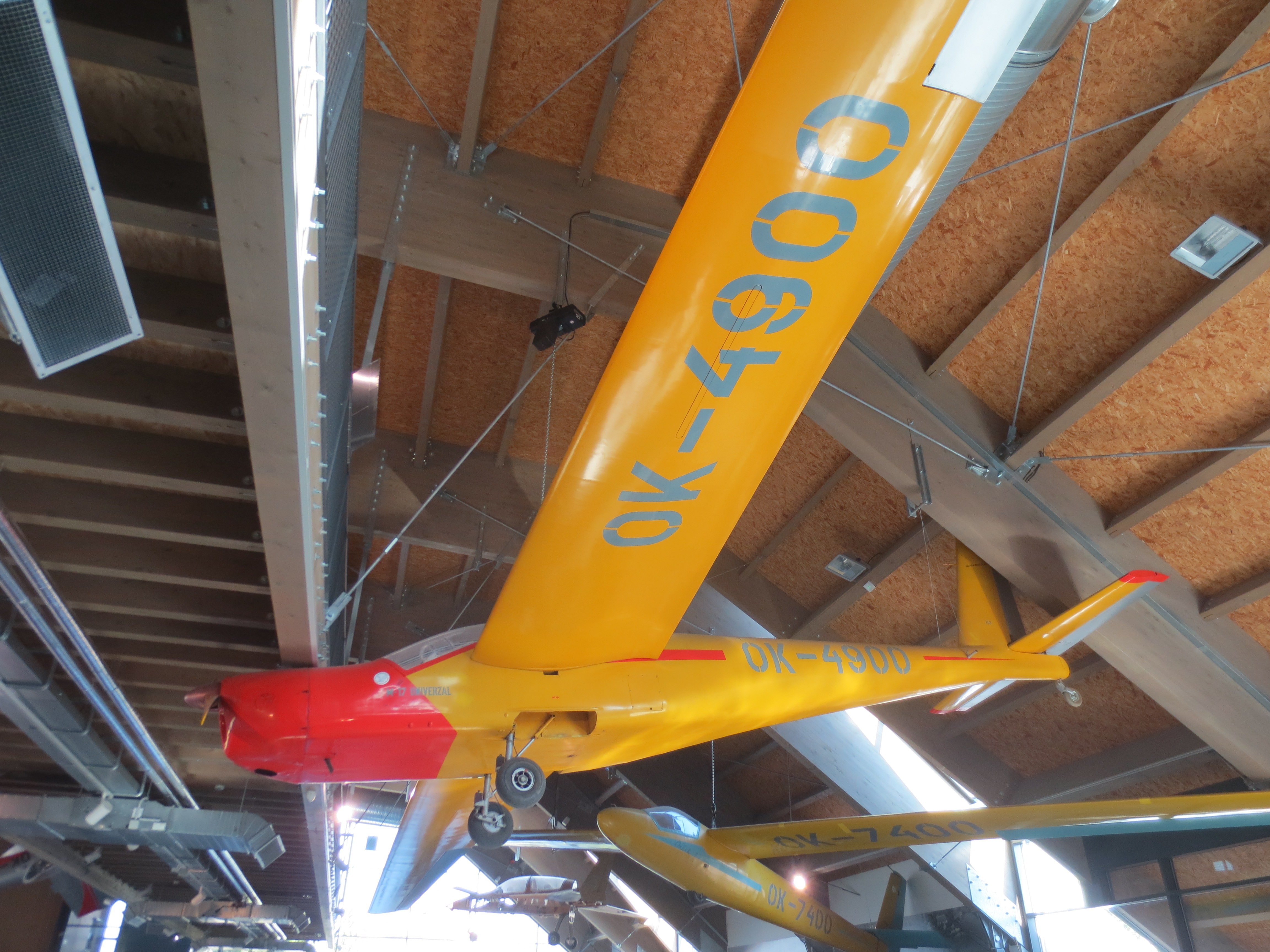 M-17 Universal a Mikron III